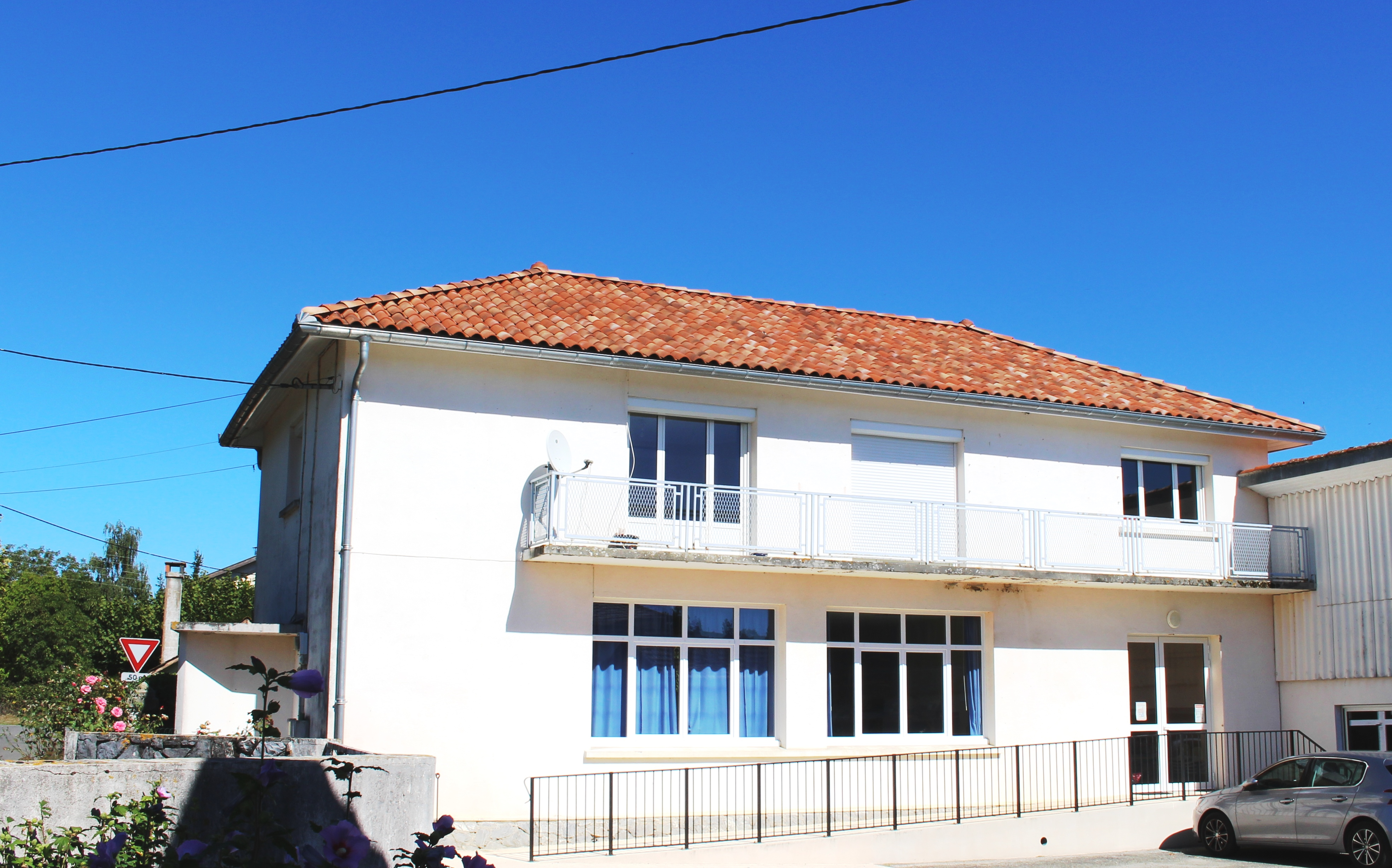 École de Villembits (Hautes-Pyrénées)